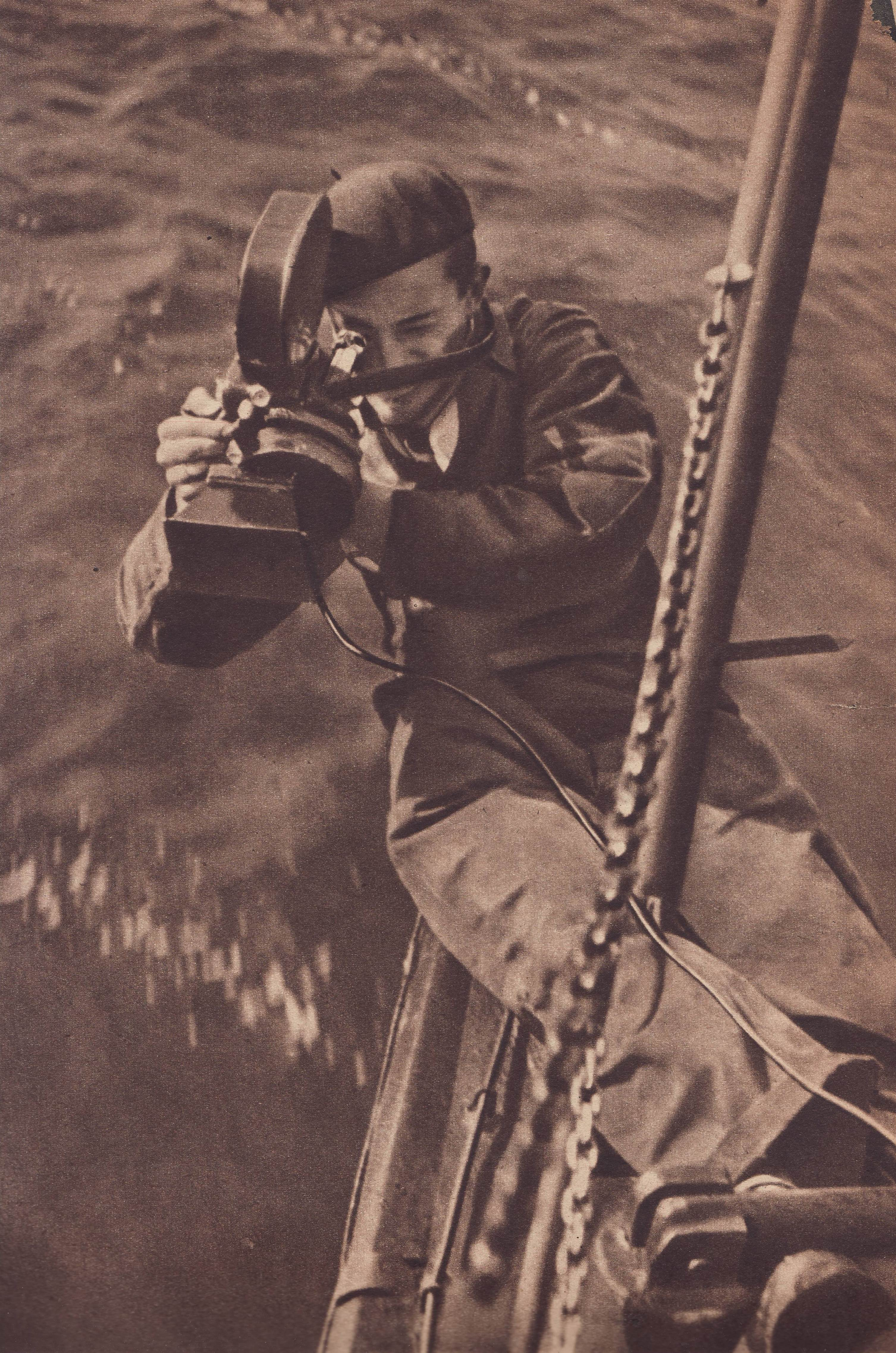 Sergiusz Sprudin operator Polskiej Kroniki Filmowej